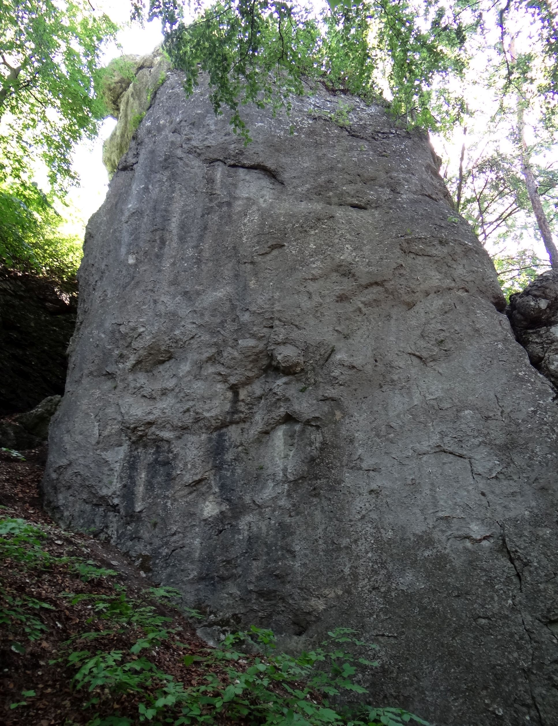 Kubincowe Skały w Pierunkowym Dole w Nielepicach